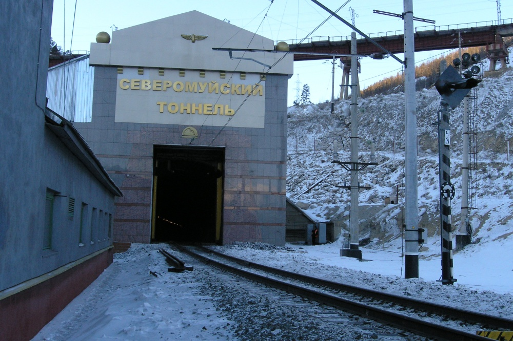 Северомуйский тоннель на БАМе, Муйский район Бурятии